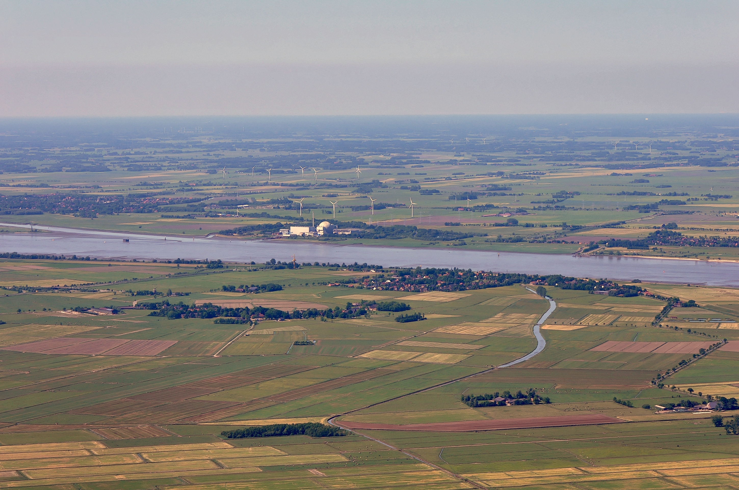 Luftbilder von der Nordseeküste 2012-05